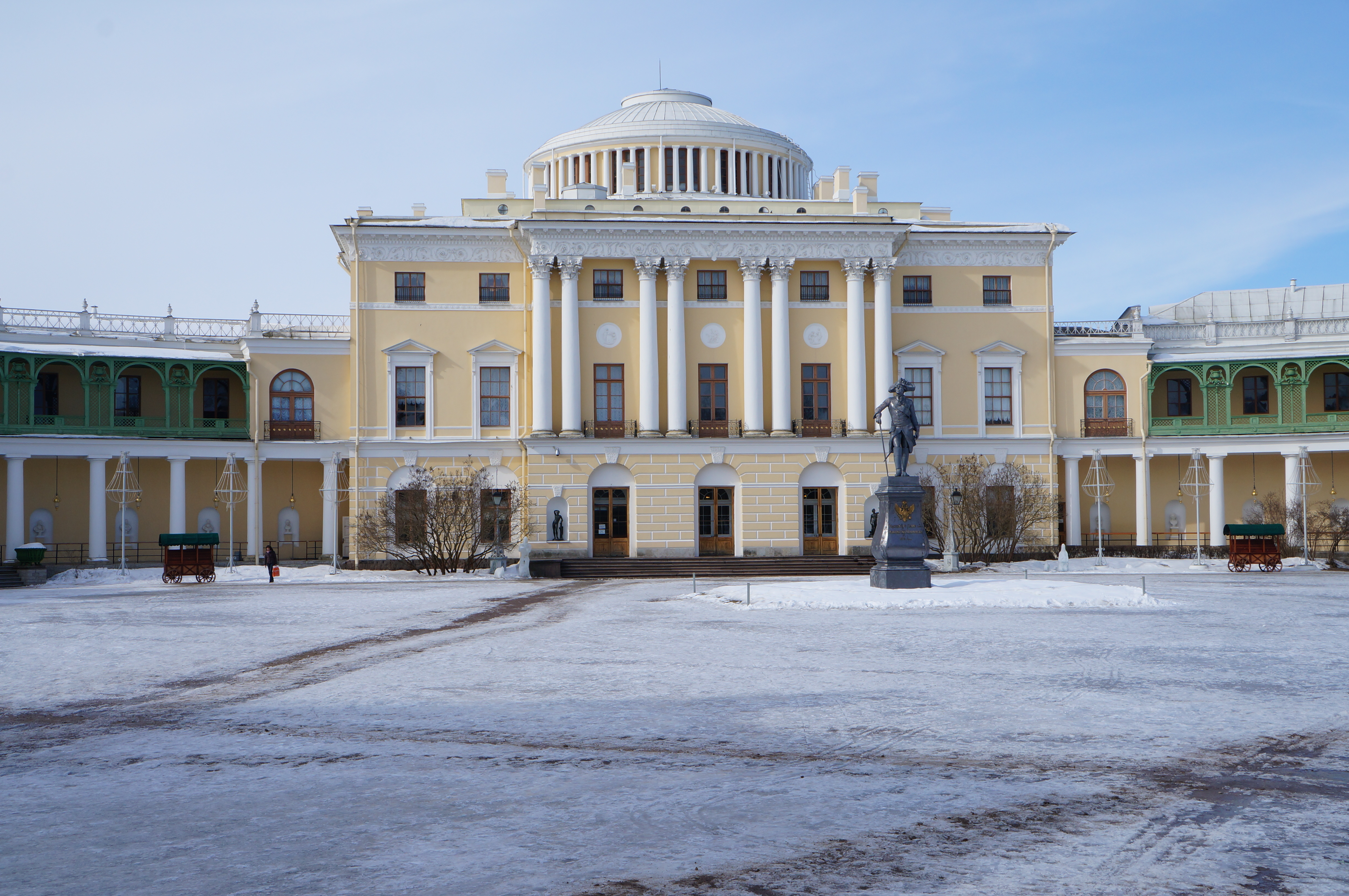 Palais de Pavlovsk.- Saint-Pétersbourg